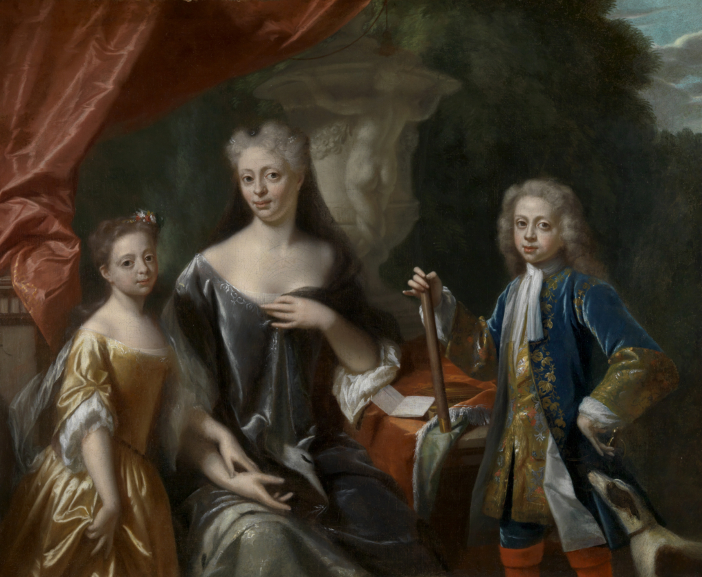 Portret van Maria Louise van Hessen-Kassel, prinses van Oranje (1688-1765), met haar kinderen prins Willem IV en prinses Amalia